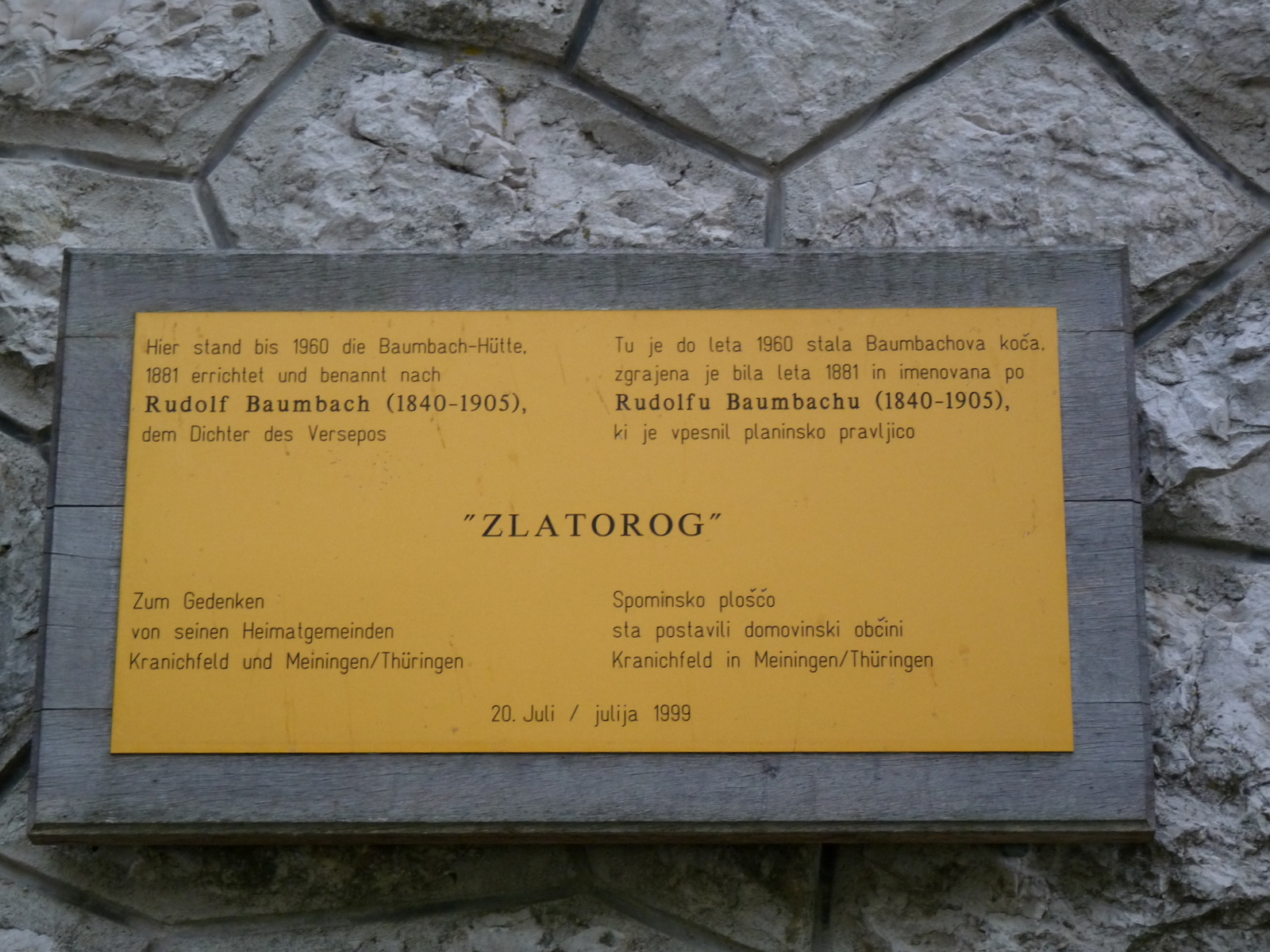 Spominska plošča na Pizzeriji Zlatorog, na mestu nekdanje Baumbachove koče v Trenti.